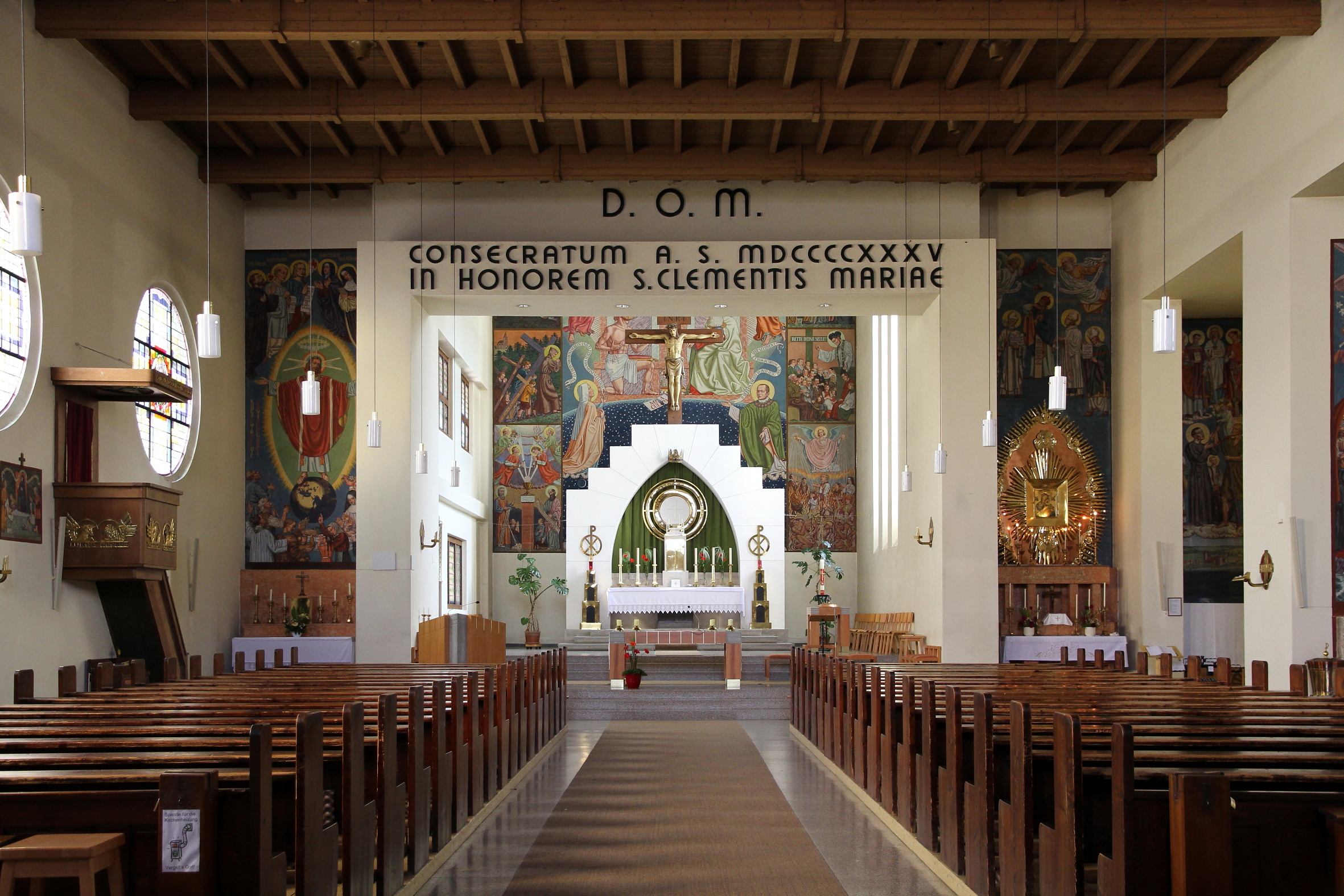 Innenansicht der katholischen Pfarrkirche hl. Clemens Maria Hofbauer der burgenländischen Bezirkshauptstadt Oberpullendorf. Die Kirche wurde 1935 erbaut und ist dem Clemens Maria Hofbauer geweiht.